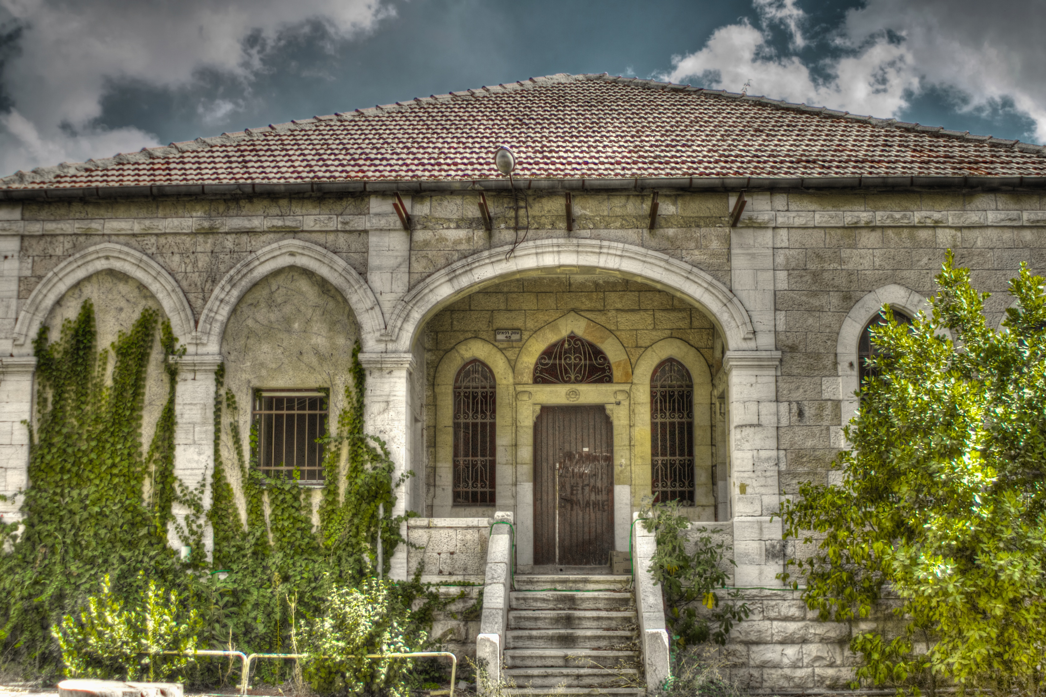 מעון ניב הוא מתחם של שלושה מבנים חד-קומתיים ברחוב עמק רפאים בירושלים, ששימש עד 2005 מעון לילדים חירשים ונערות חוסות. נבנה בסוף שנות ה-20 על מתחם של 3.6 דונם. כיום המתחם נטוש ומיועד להקמת מרכזי פנאי ומלון בוטיק.